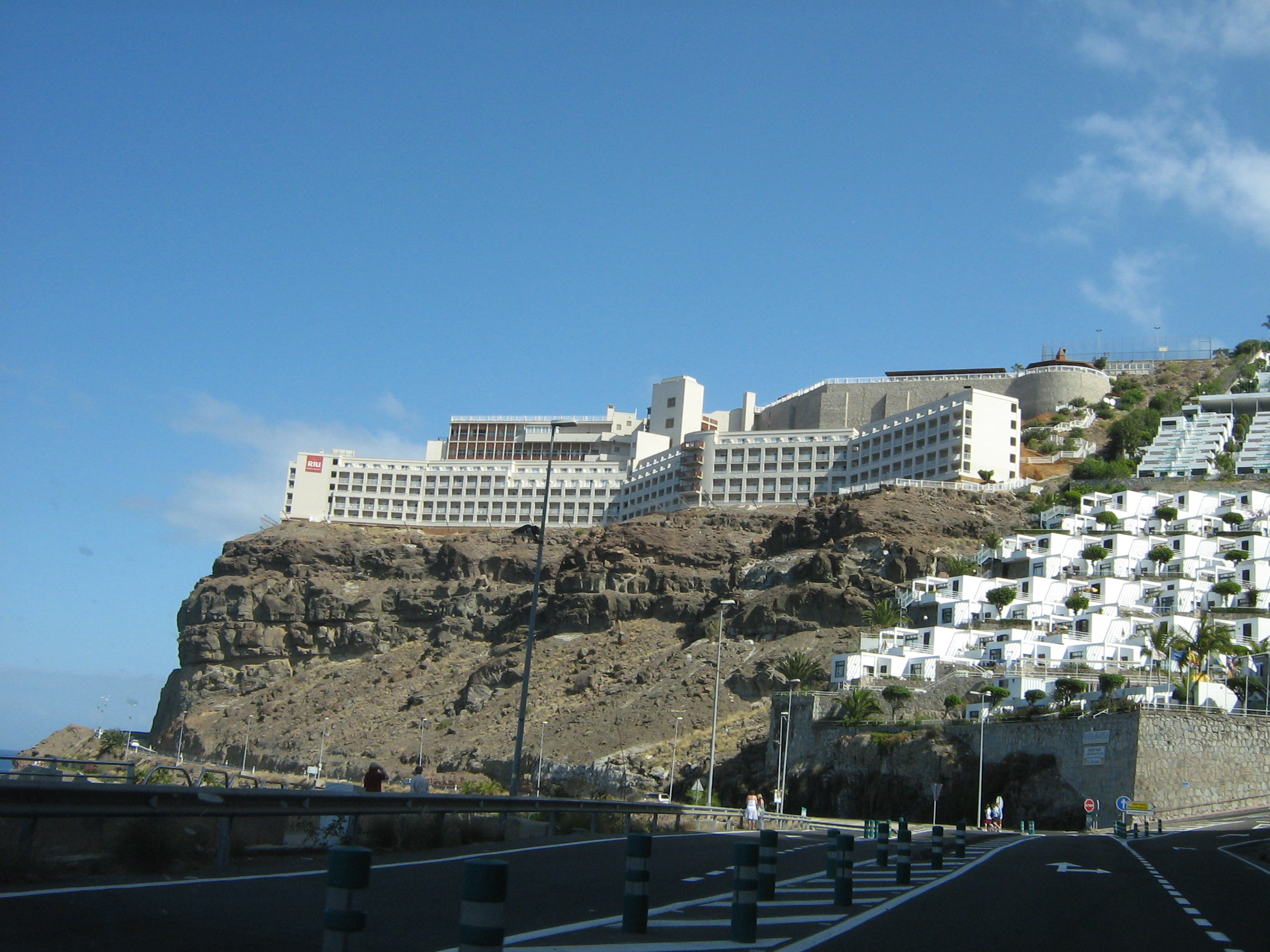 Das RIU Vistamar, selbst fotograhiert